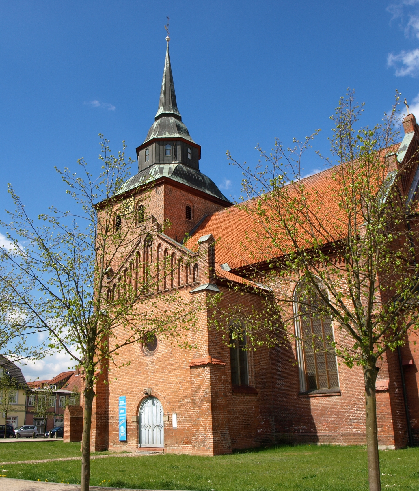 Marienkirche Boizenburg Südportal